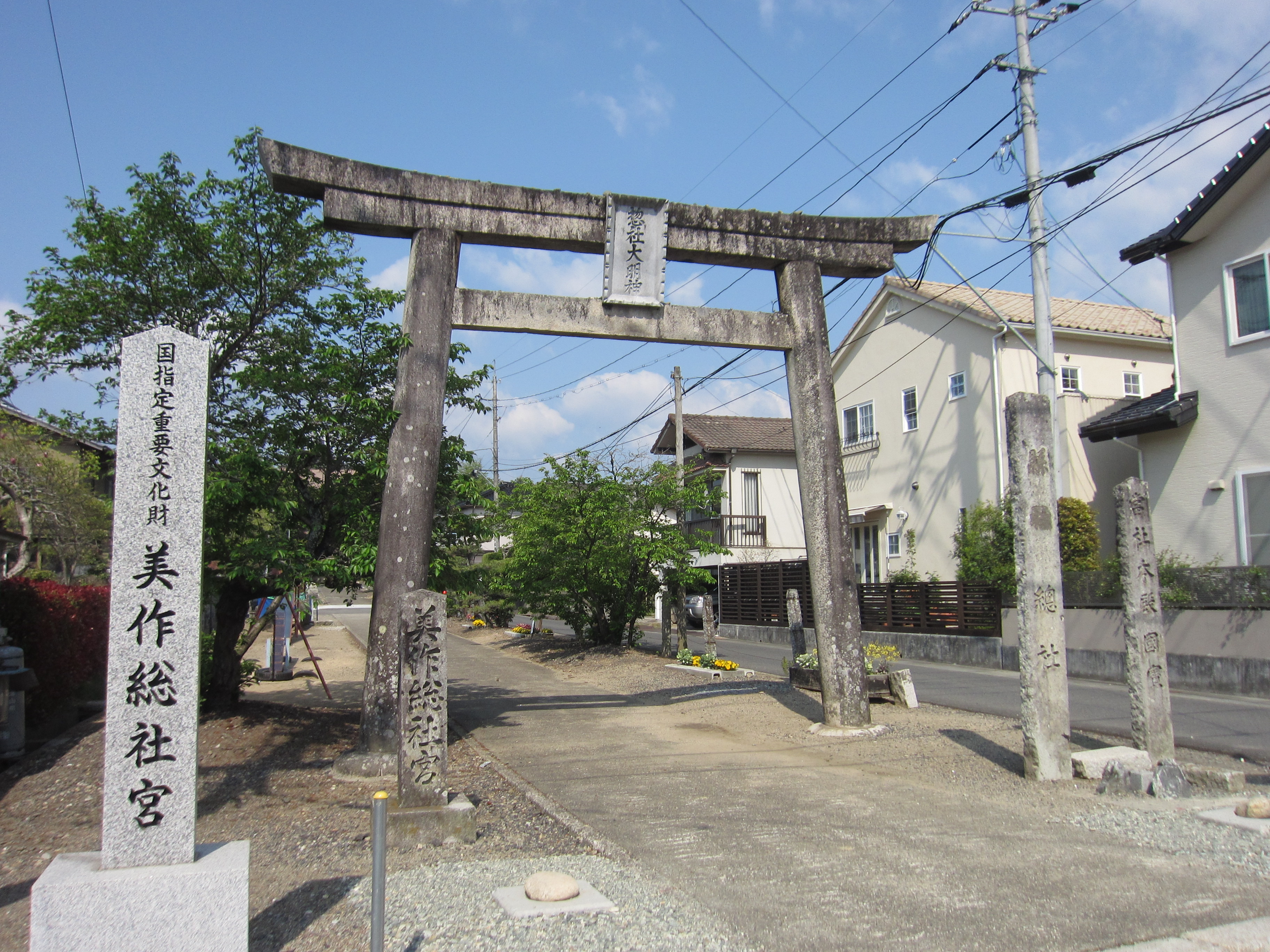 美作総社宮 社殿